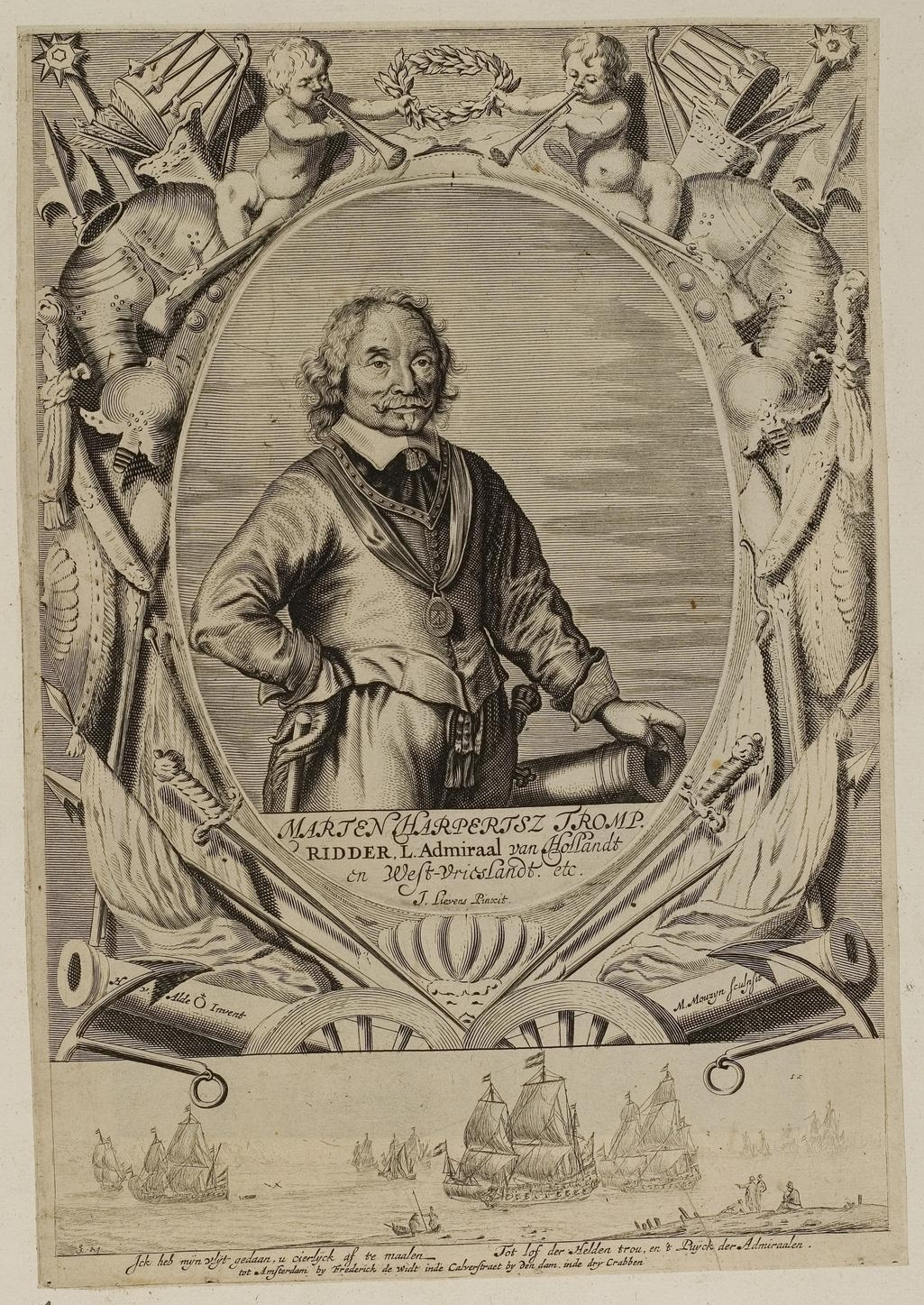 Grafik aus dem Klebeband Nr. 1 der Fürstlich Waldeckschen Hofbibliothek Arolsen Motiv: Maarten Harperszoon Tromp